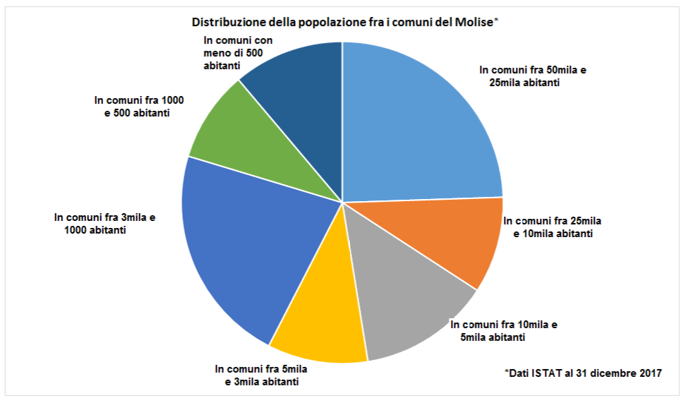 Distribuzione della popolazione molisana